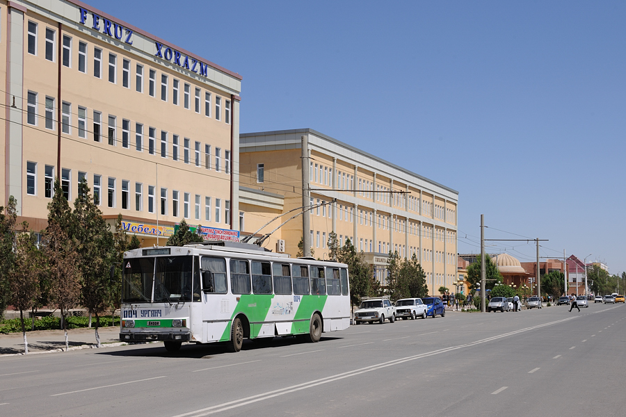 Škoda 14Tr 004 in Urganch